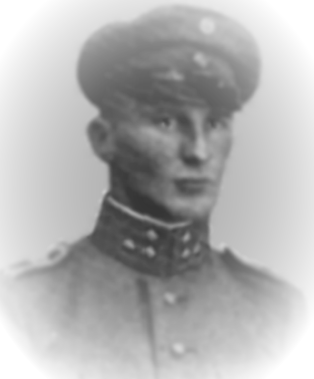 Description